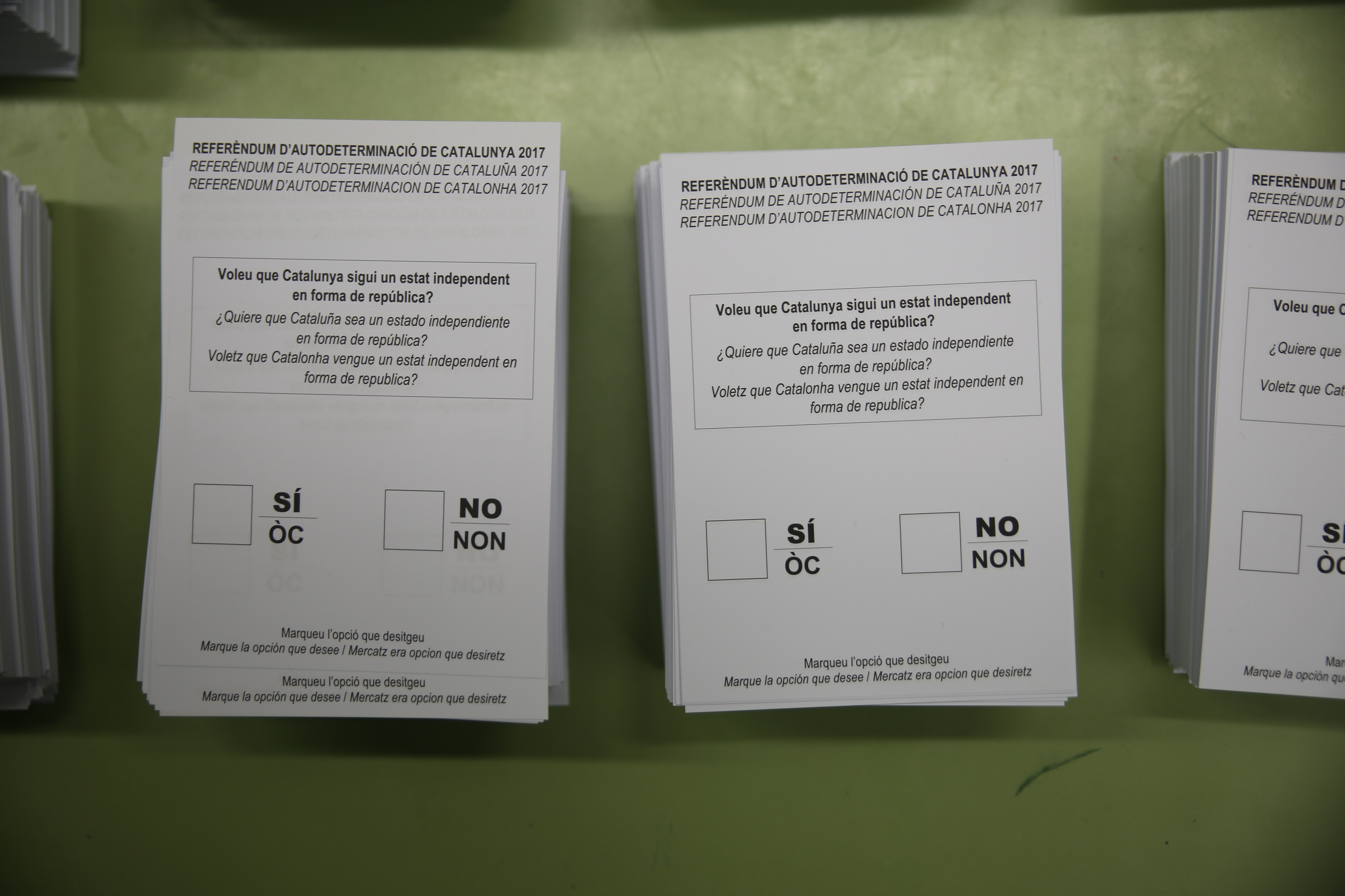 Referendum de independencia de Cataluña del 1 de octubre de 2017 Wikipedia: Catalan independence referendum, 2017 See alsocategory: Catalan independence referendum, 2017.